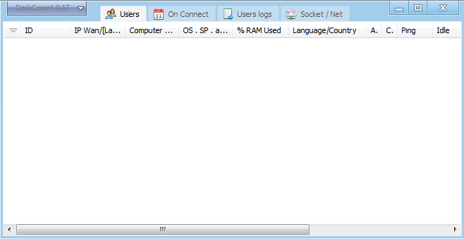 نرم افزار مدیریت از راه دور